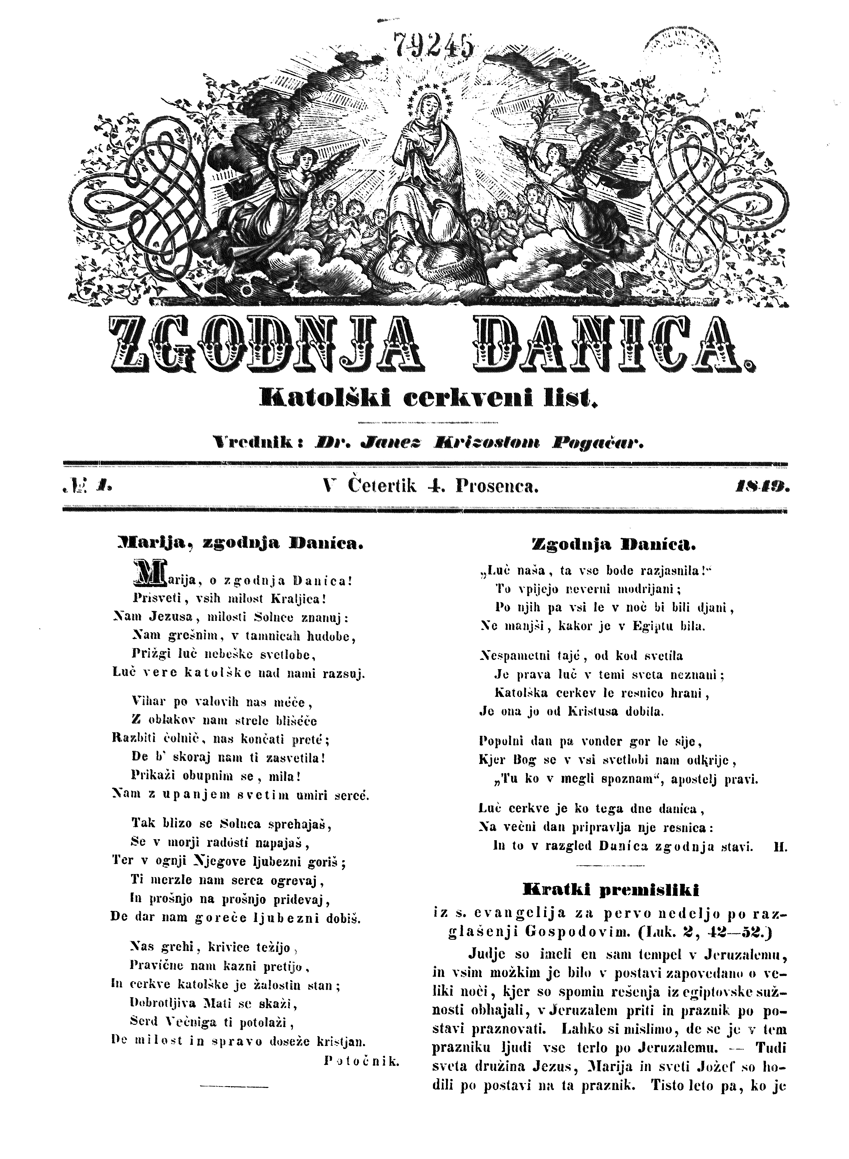 Naslovnica časopisa Zgodnja danica, 4. januarja 1849.